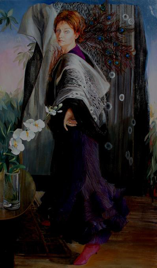 Autorretrato, año 2006. 195X97 cm.